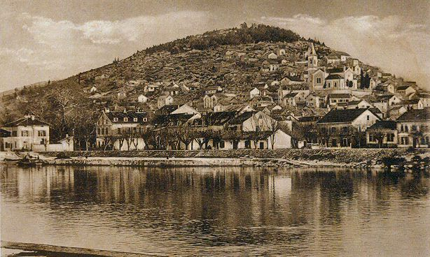 Dozvola dobijena od